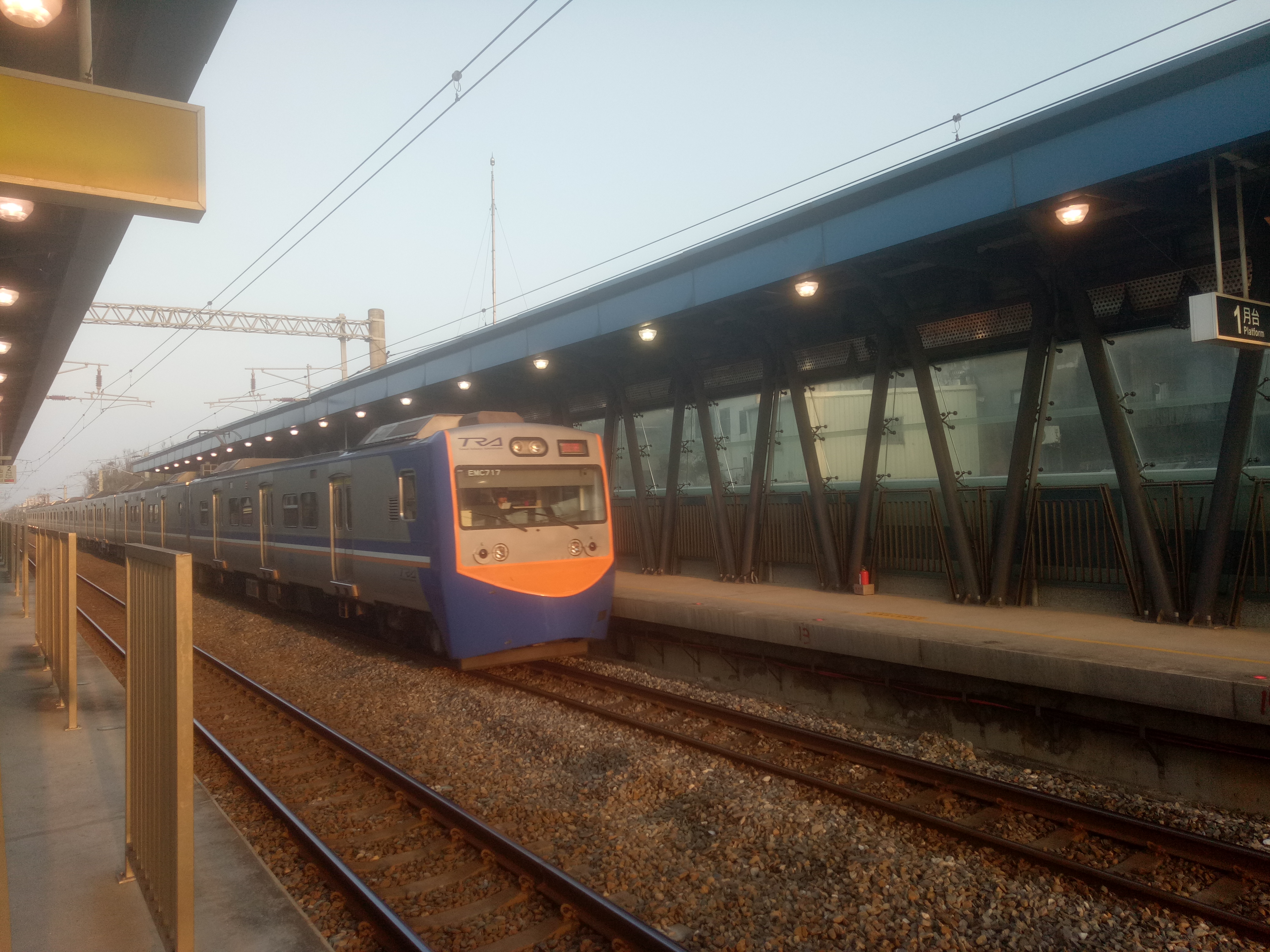 台鐵電聯車EMU717停靠新富車站第一月台。